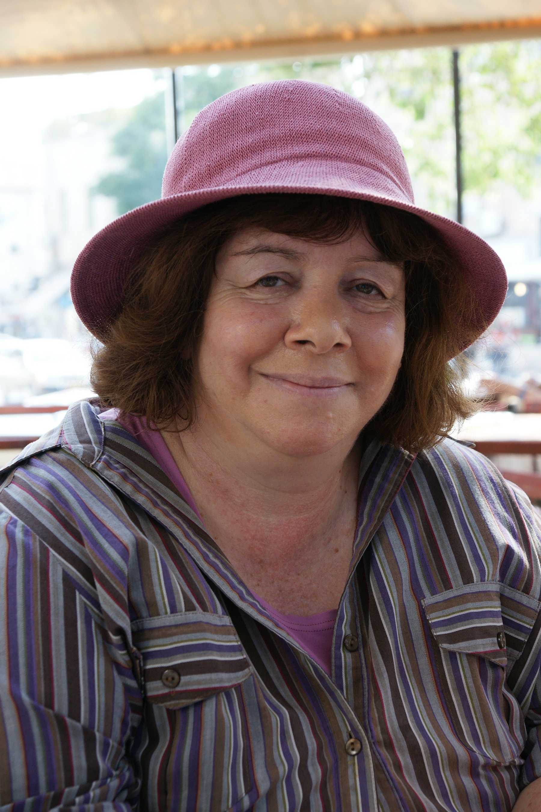 במבי שלג